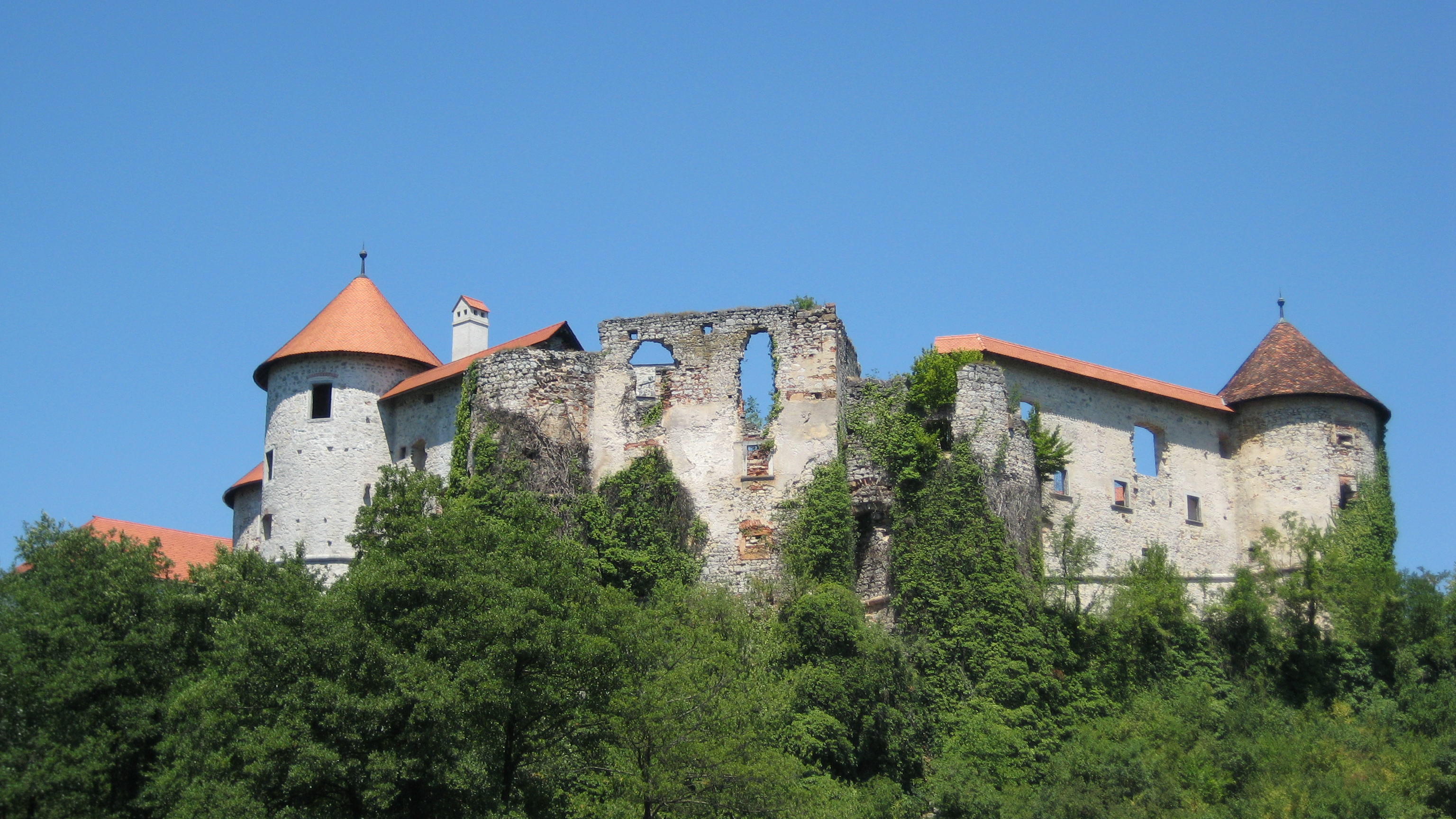 Žužemberk castle, Slovenia